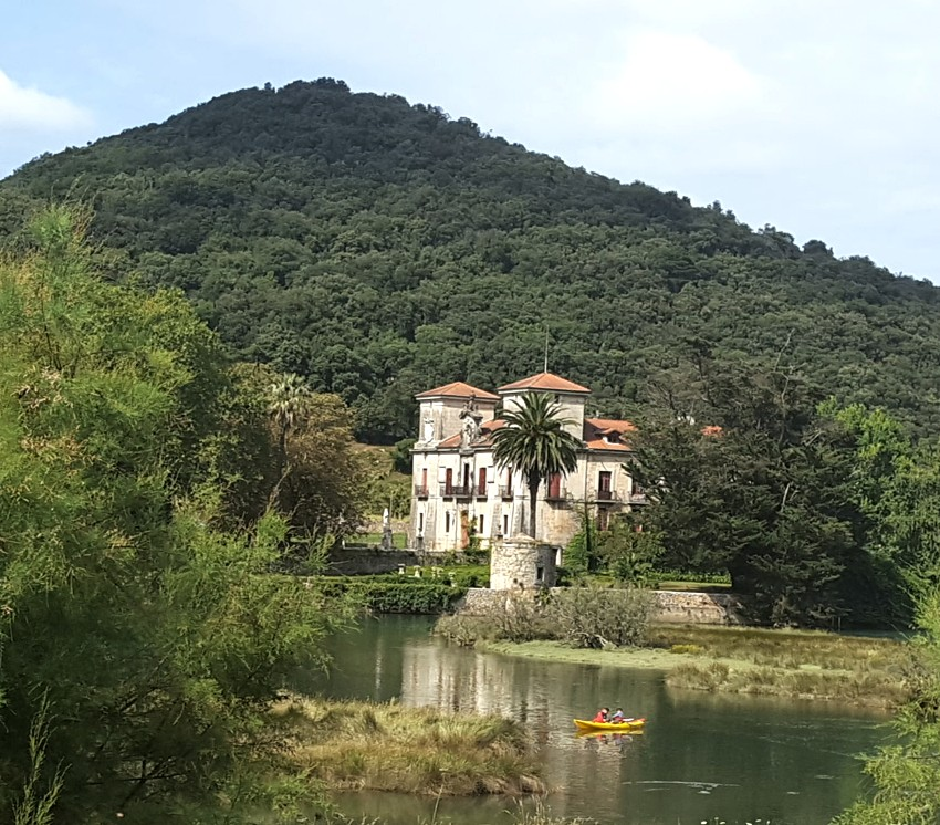 Zubieta jauregia